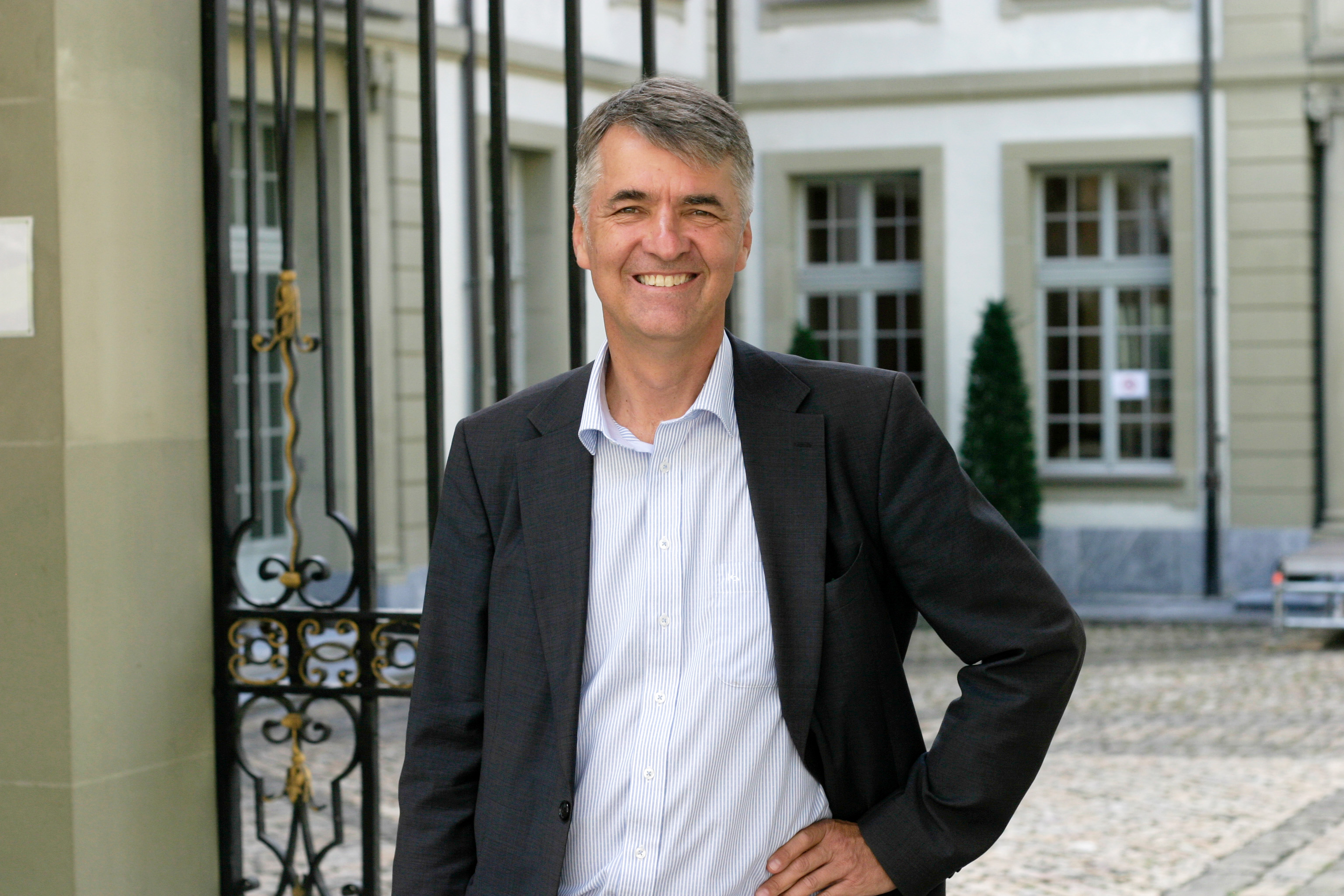 Stadtpräsident Alec von Graffenried im Jahr 2019 vor dem Erlacherhof in Bern.